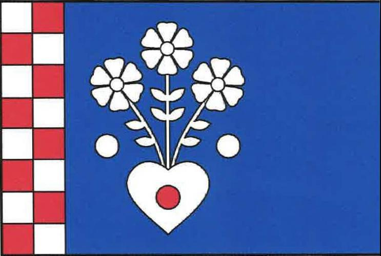 Vlajka, Rychnov na Moravě, okres Svitavy